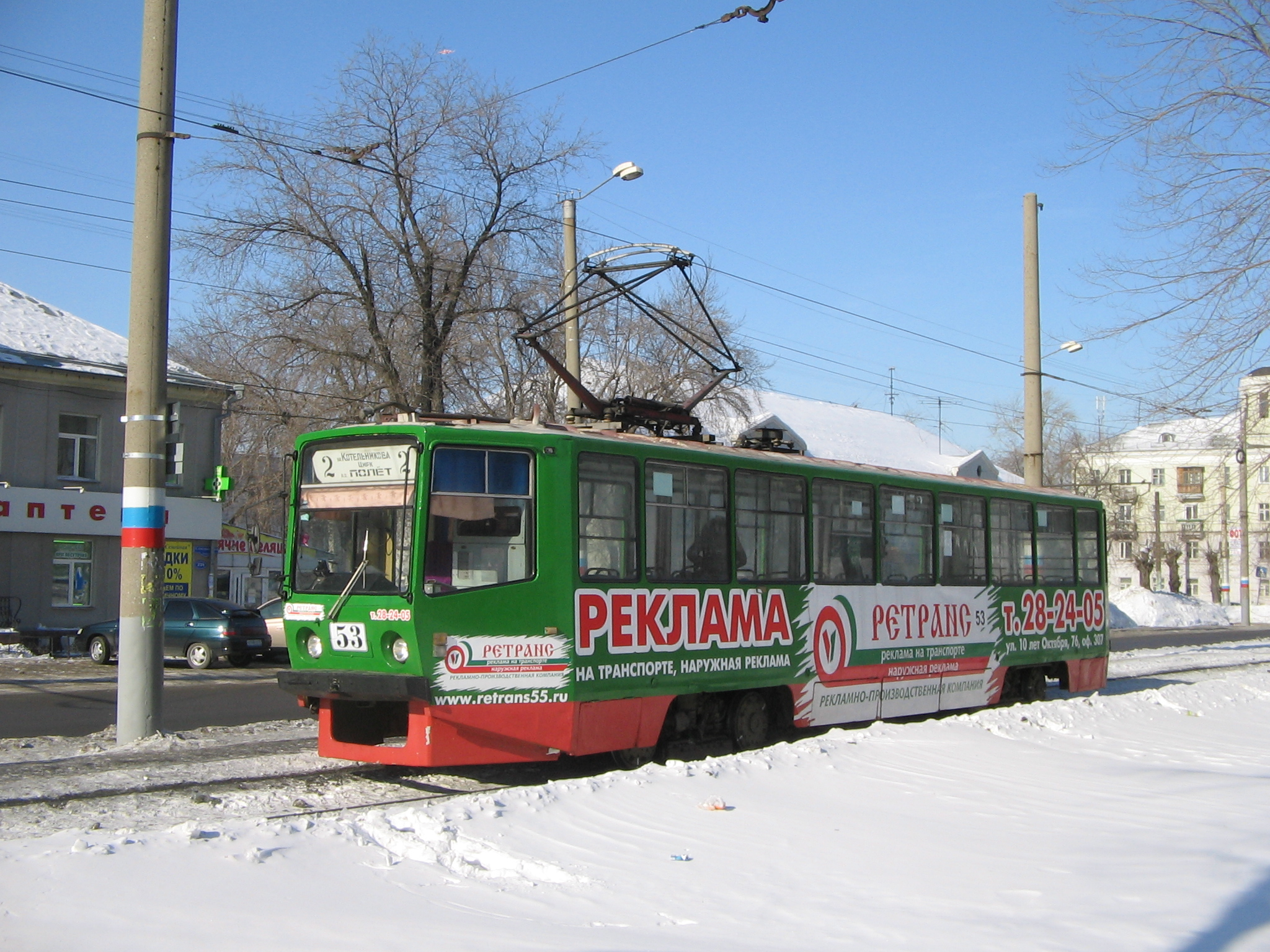 Трамвай 71-608КМ